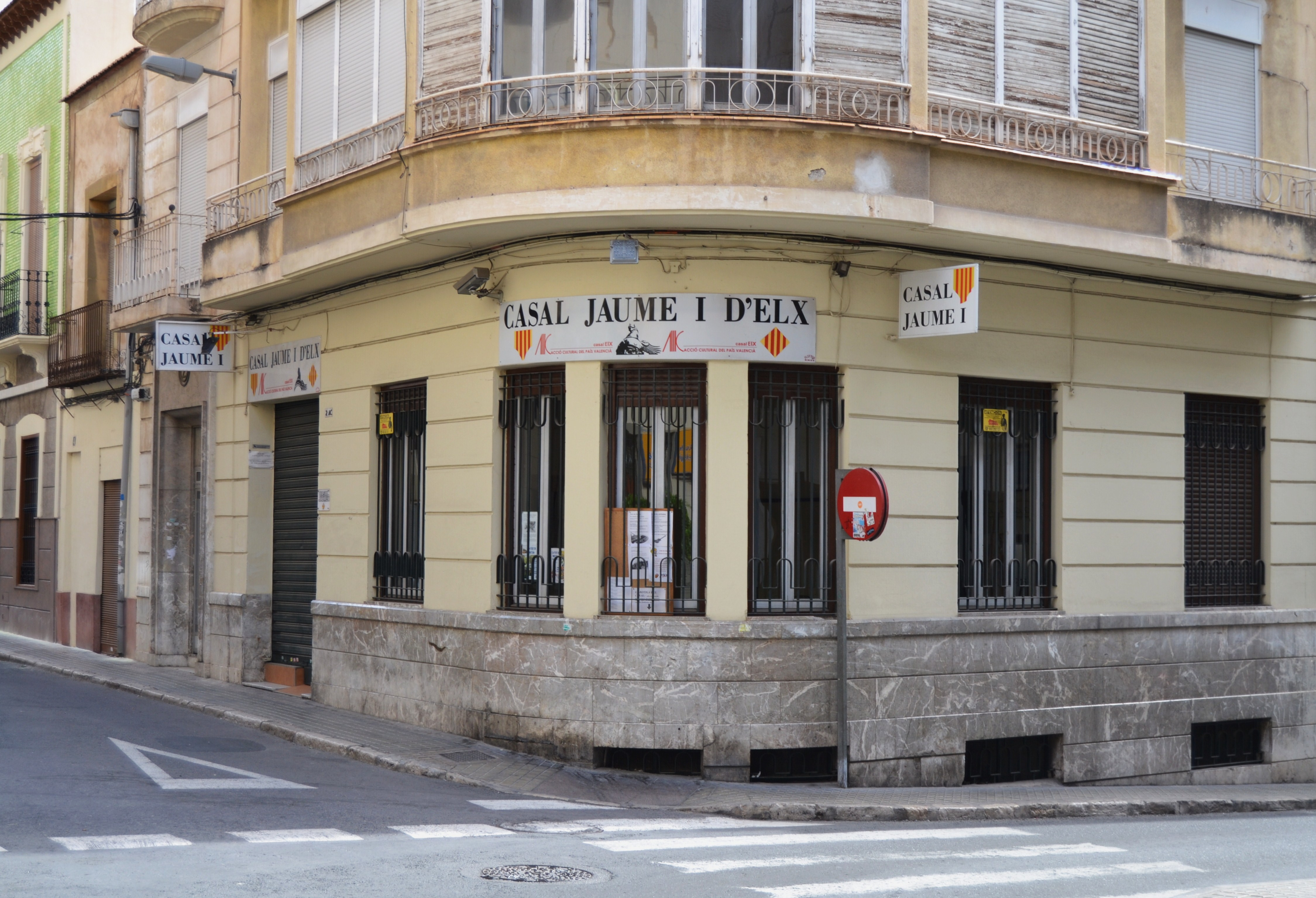 Casal Jaume I d'Elx.